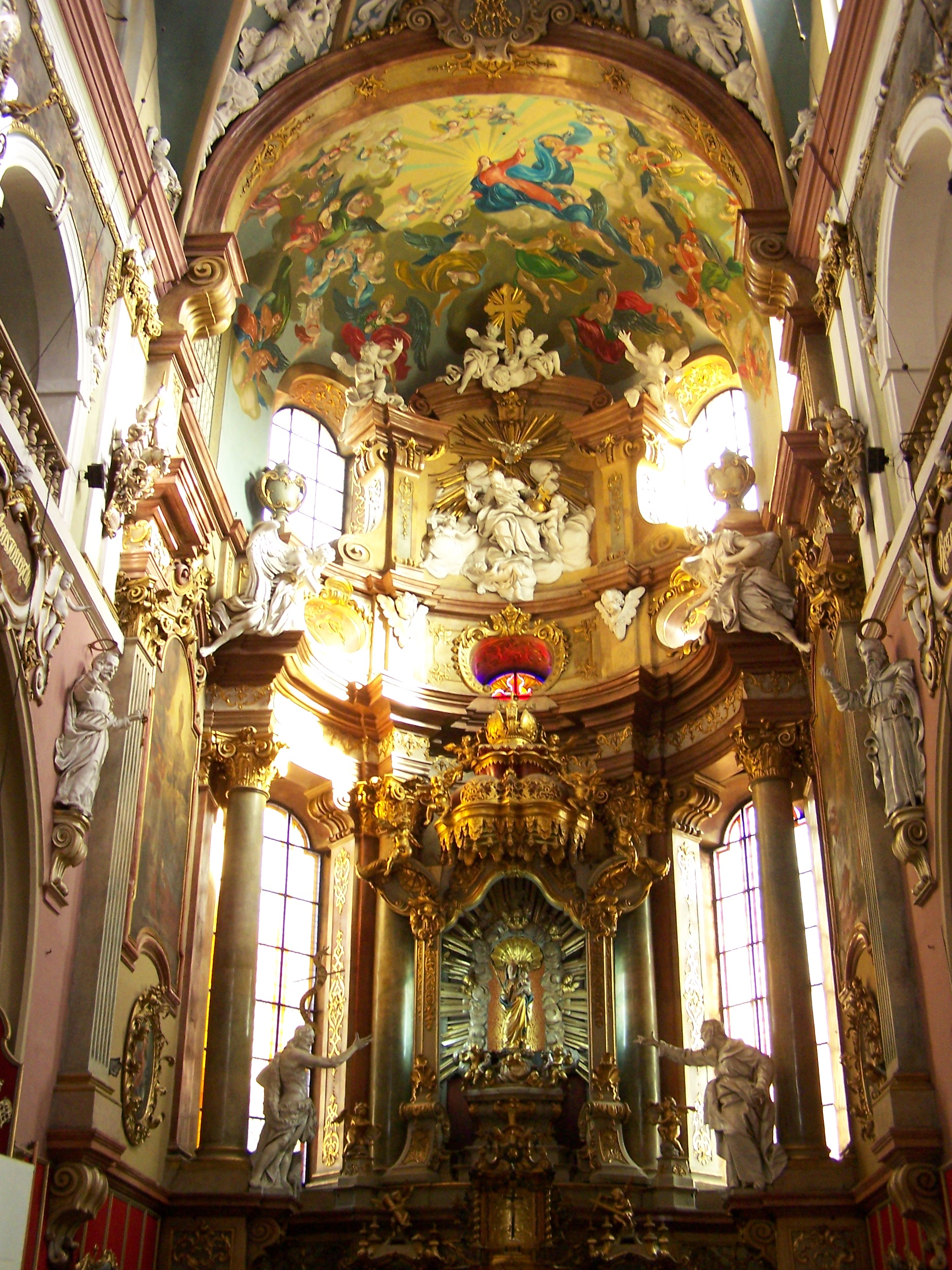 Prezbiterium i ołtarz kościoła pw. Wniebowzięcia Najświętszej Marii Panny w Kłodzku.